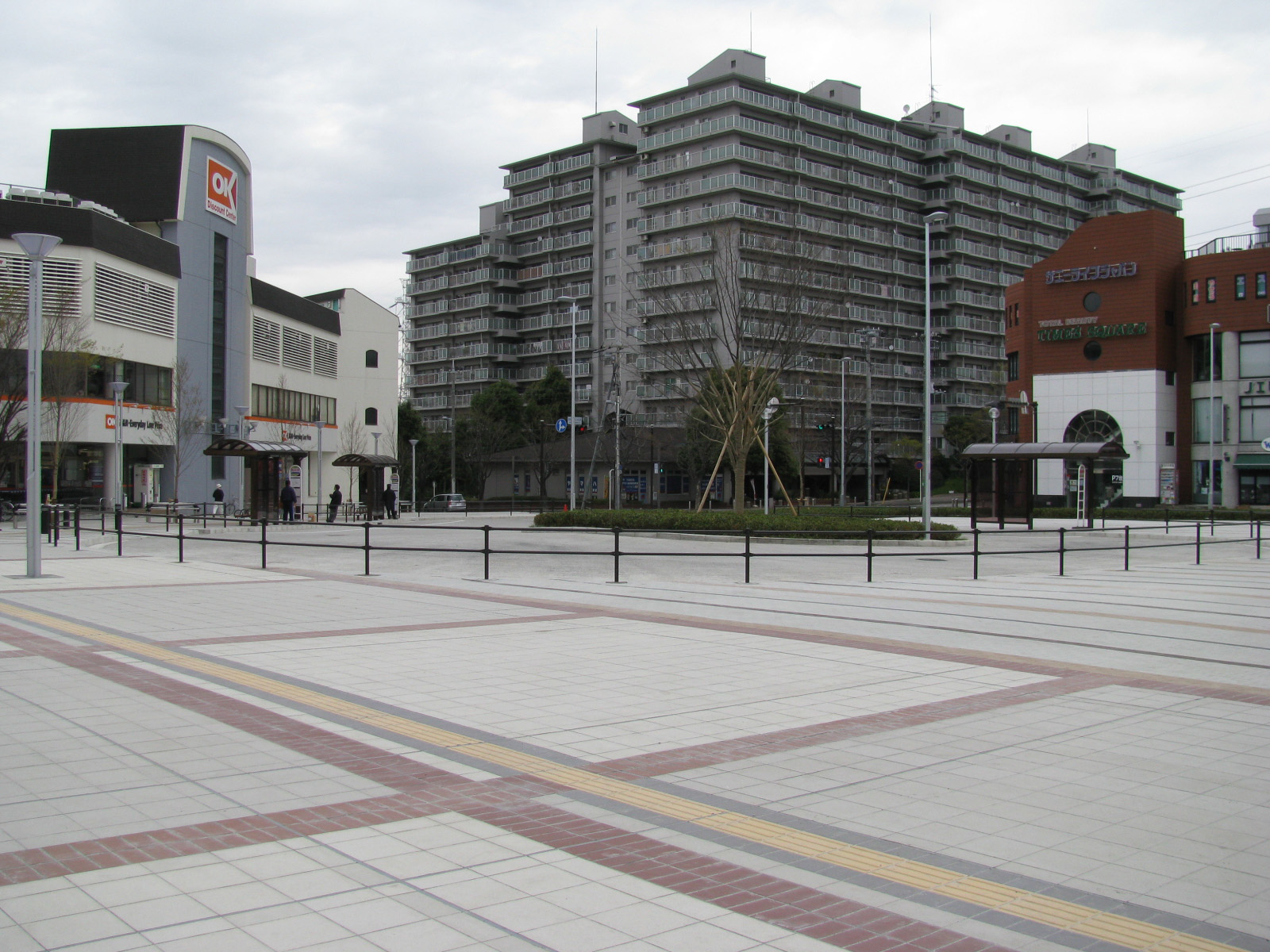 横浜市営地下鉄グリーンライン都筑ふれあいの丘駅